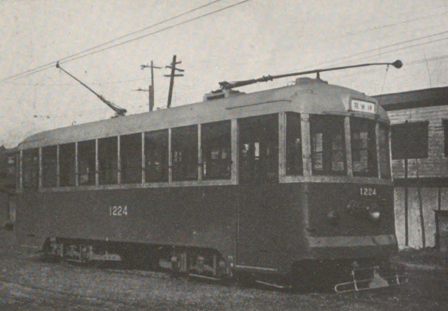 東京市電気局時代の1200形1224号電車。